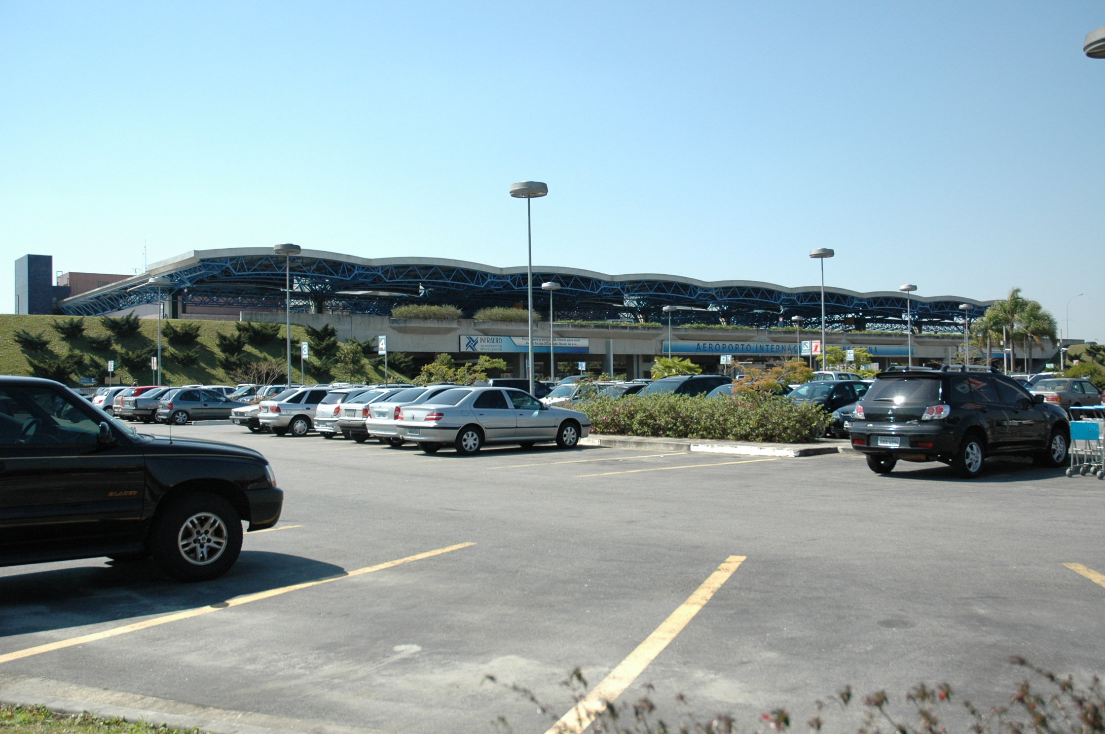 Aeroporto Internacional Afonso Pena